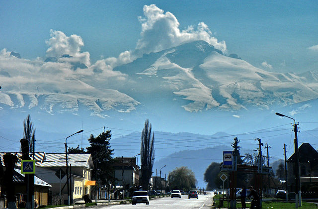 Вид на Кавказский горы с северных окраин города Нальчик утром